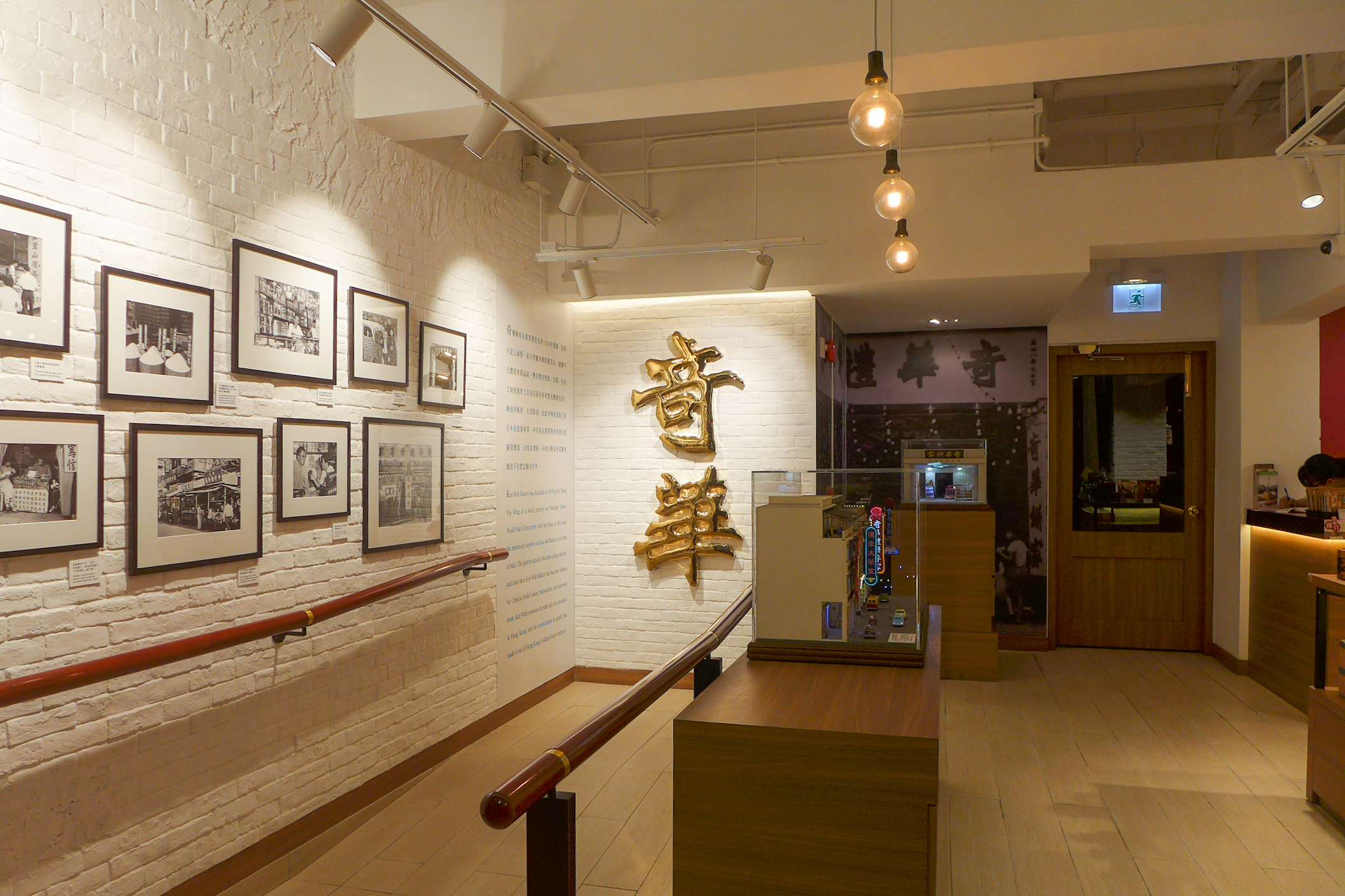 Kee Wah Bakery in Wan Chai Lee Tung Avenue